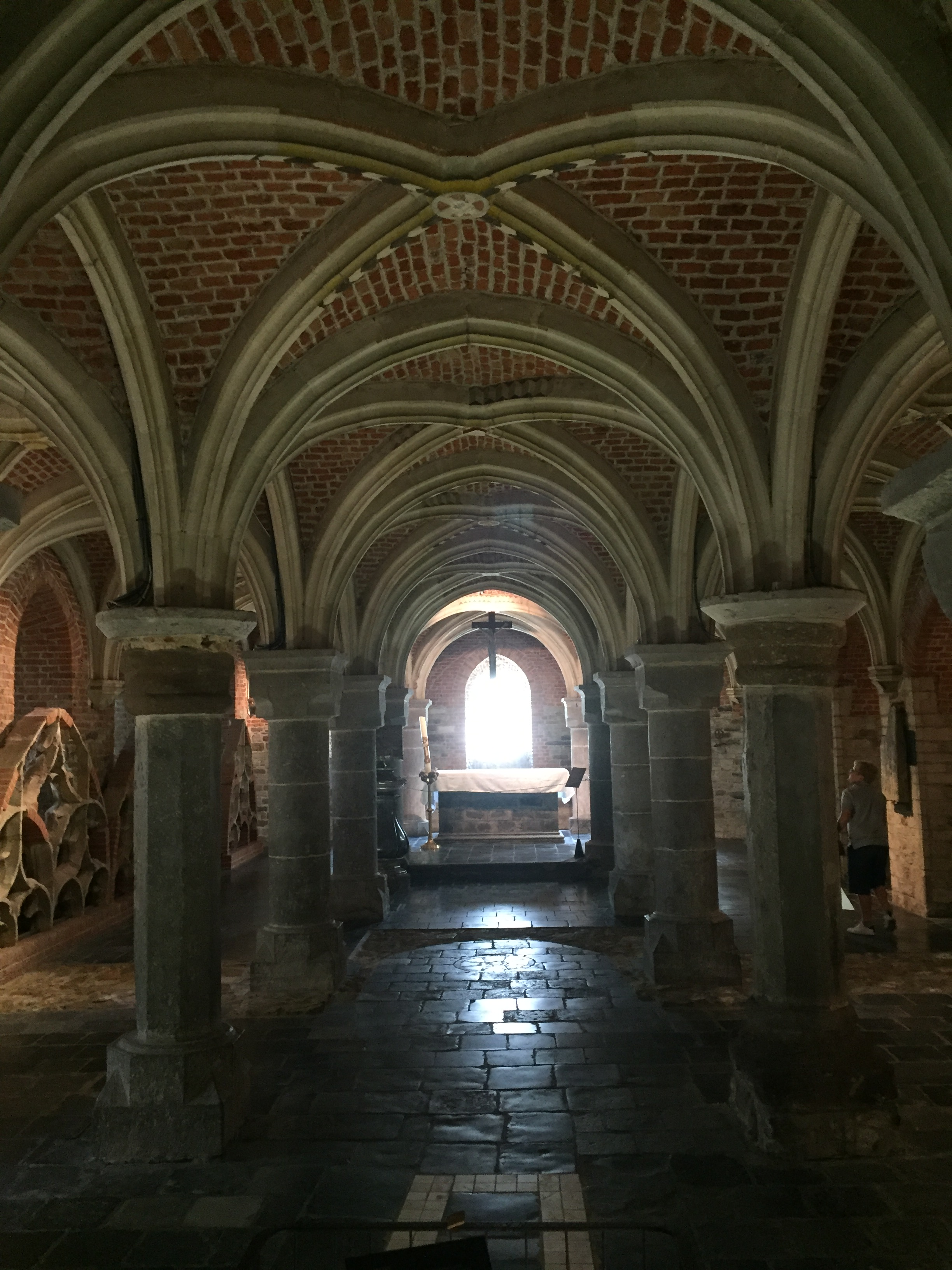 idem